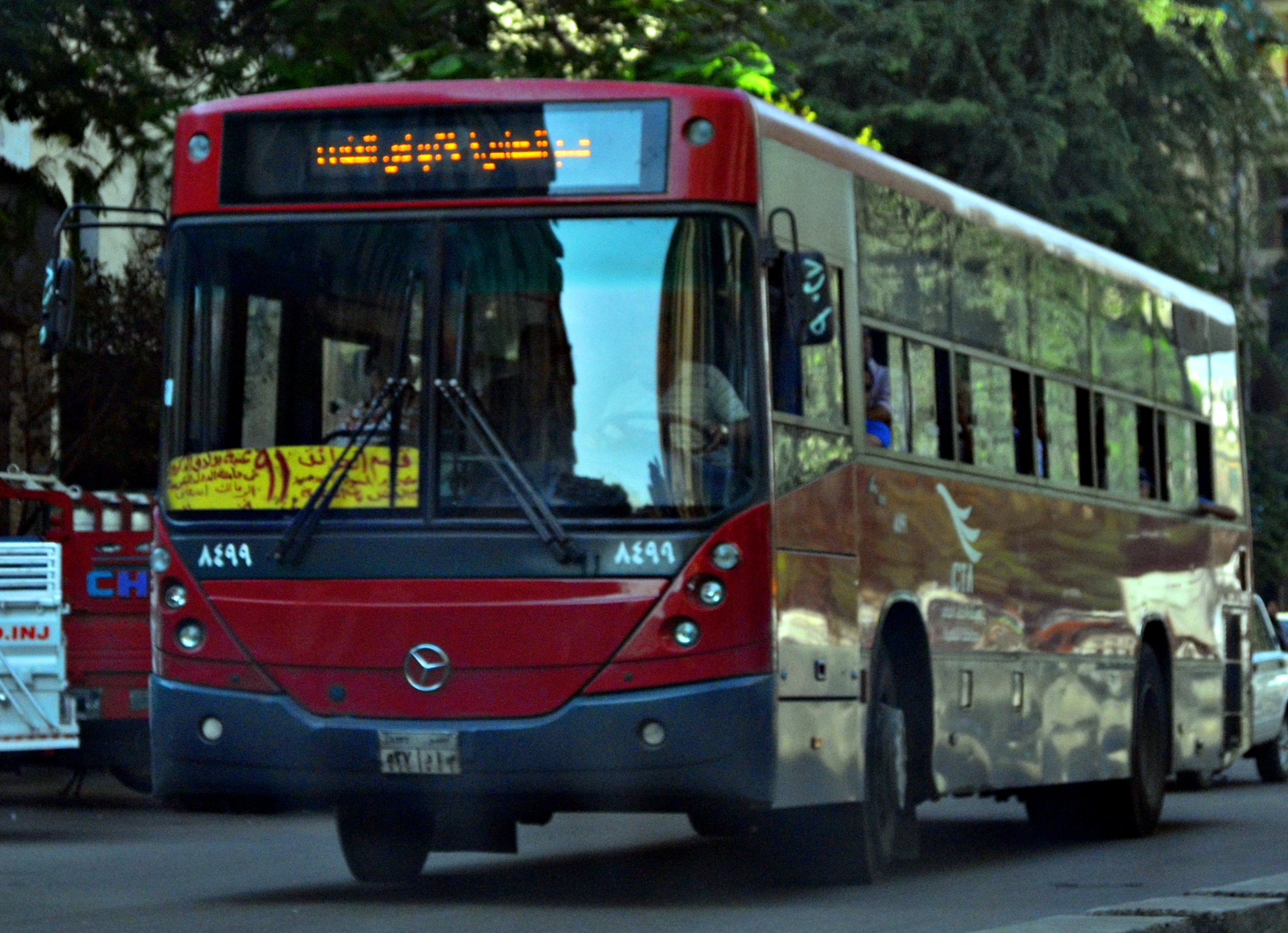 الأتوبيس العام بالقاهرة.